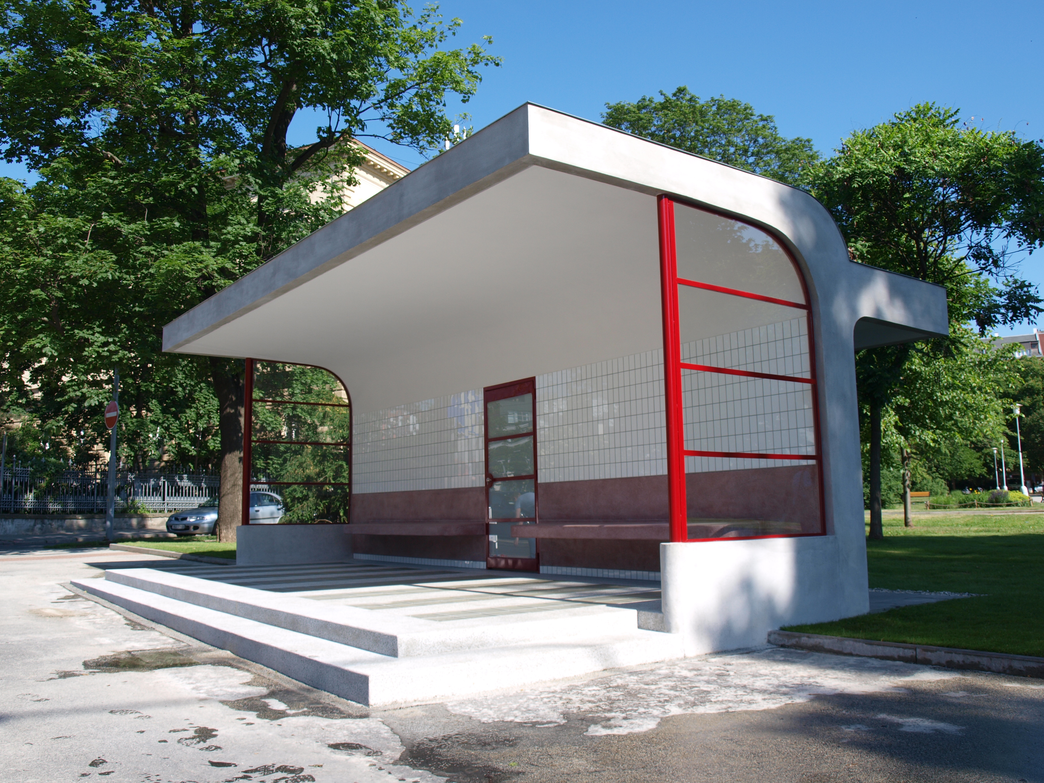 Rekonstruovaná zastávka na Obilním trhu v červnu 2017